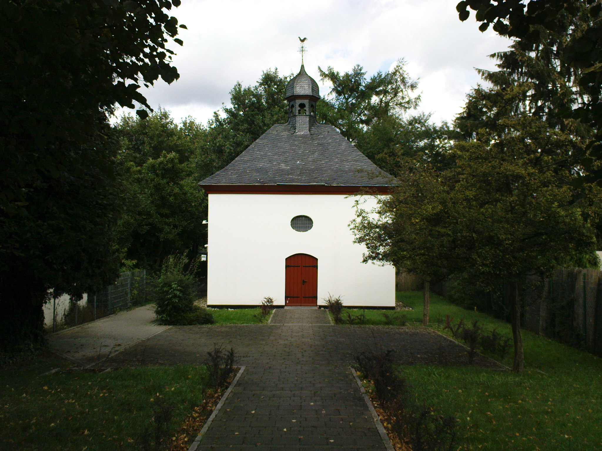 Kreuzkapelle in Leverkusen-Lützenkirchen